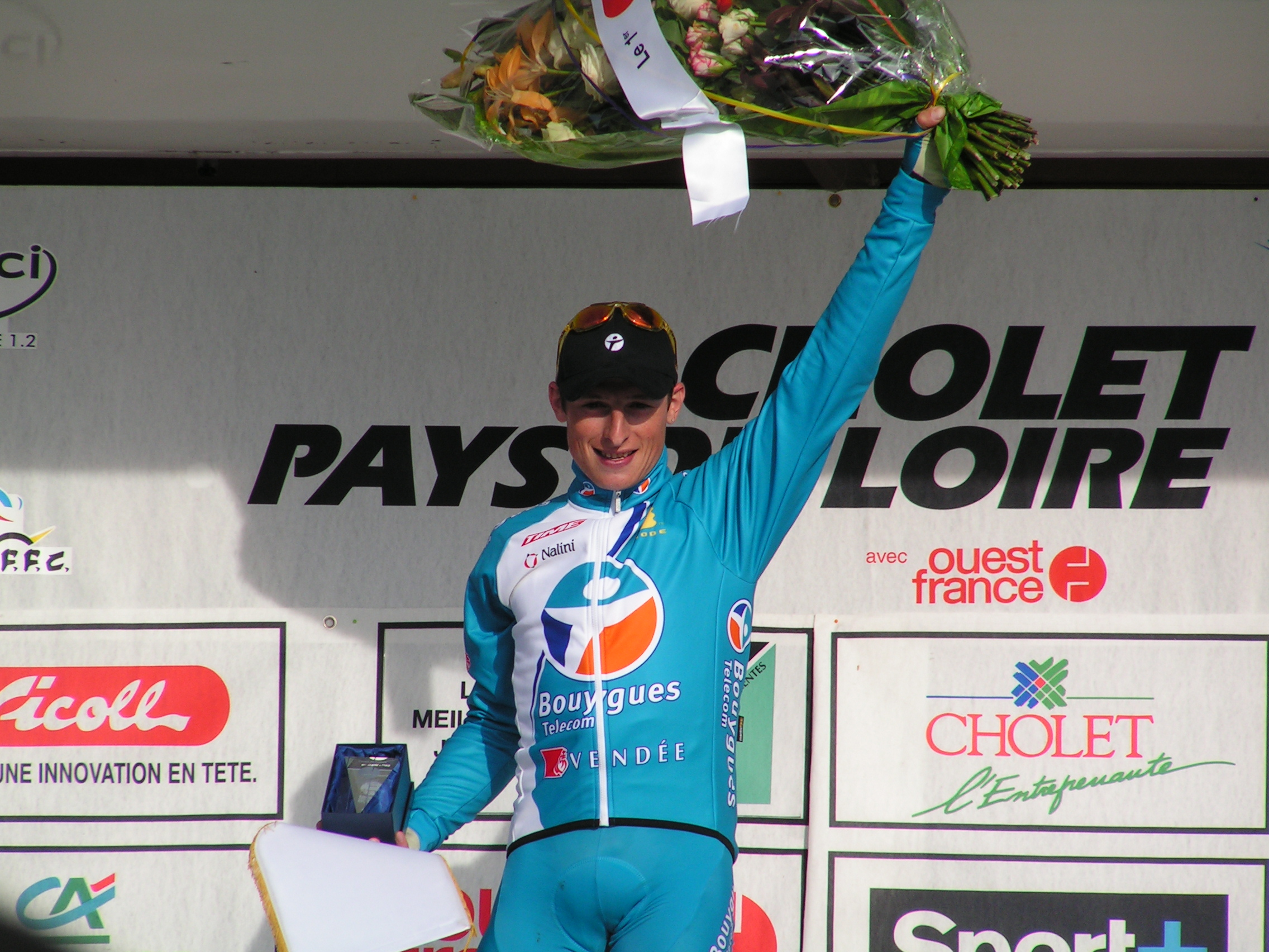 Pierrick Fédrigo (Bouygues Telecom) sur le podium. (Photo personnelle)